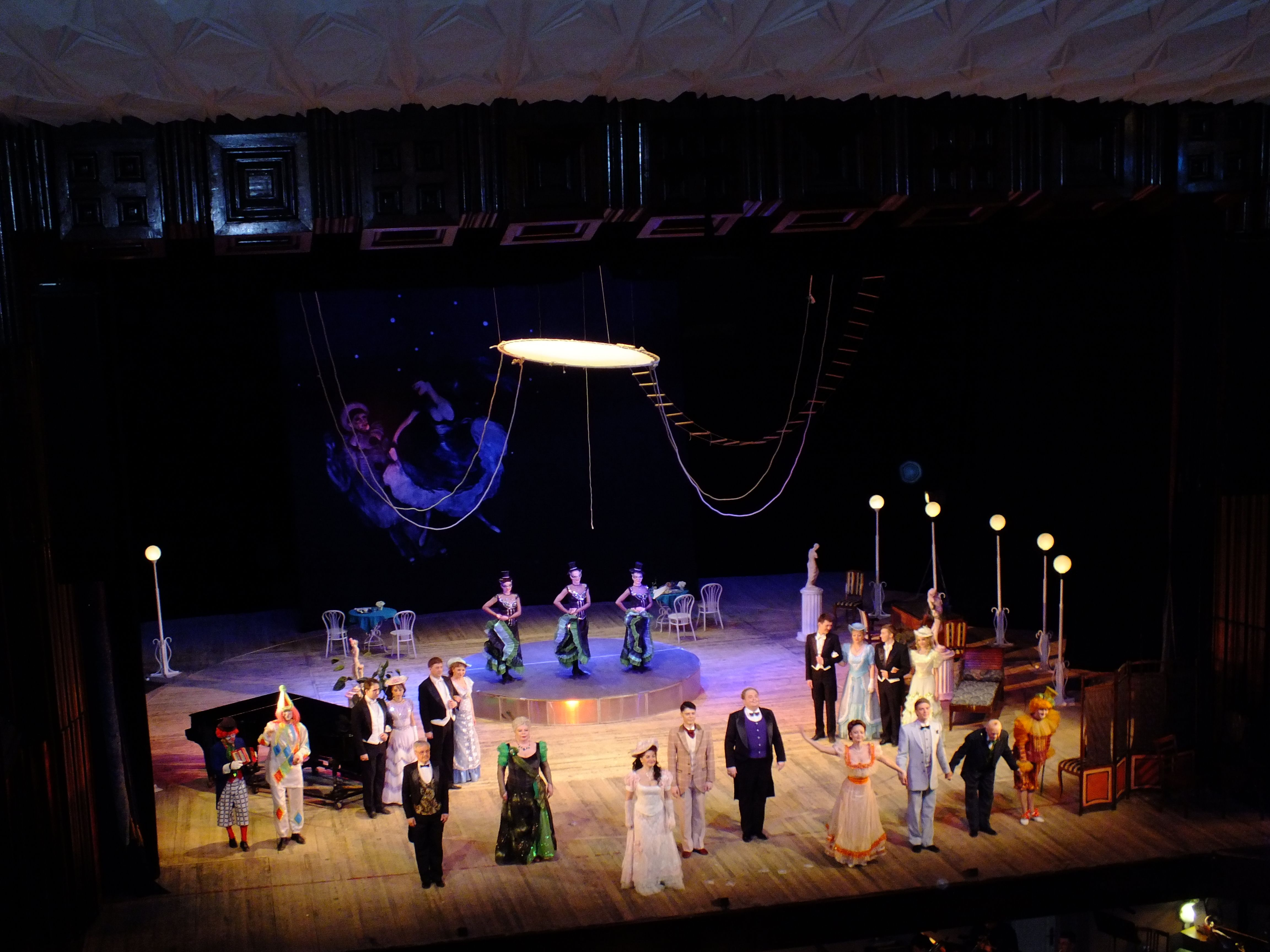 Хабаровский краевой музыкальный театр